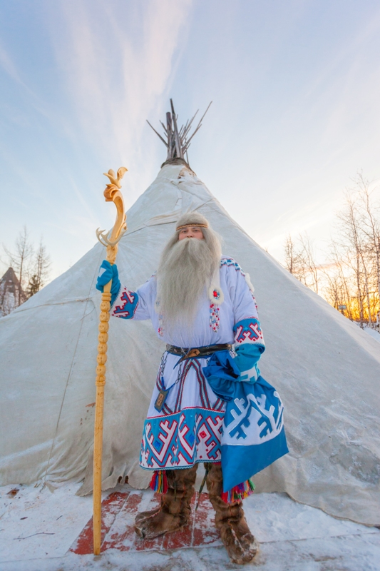 Ямал Ири в своей традиционной одежде